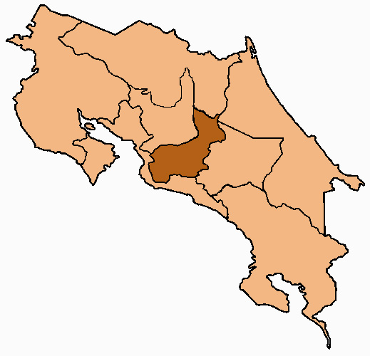 Mappa dell'arcidiocesi di San José, in Costa Rica. Lavoro personale, eseguito a partire da questa immagine di Commons. Fonte per i confini delle diocesi